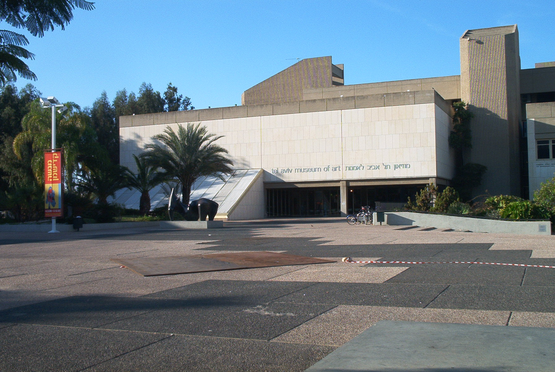 מוזאון תל אביב לאומנות/Tel Aviv Museum of Art in Tel Aviv/Israel